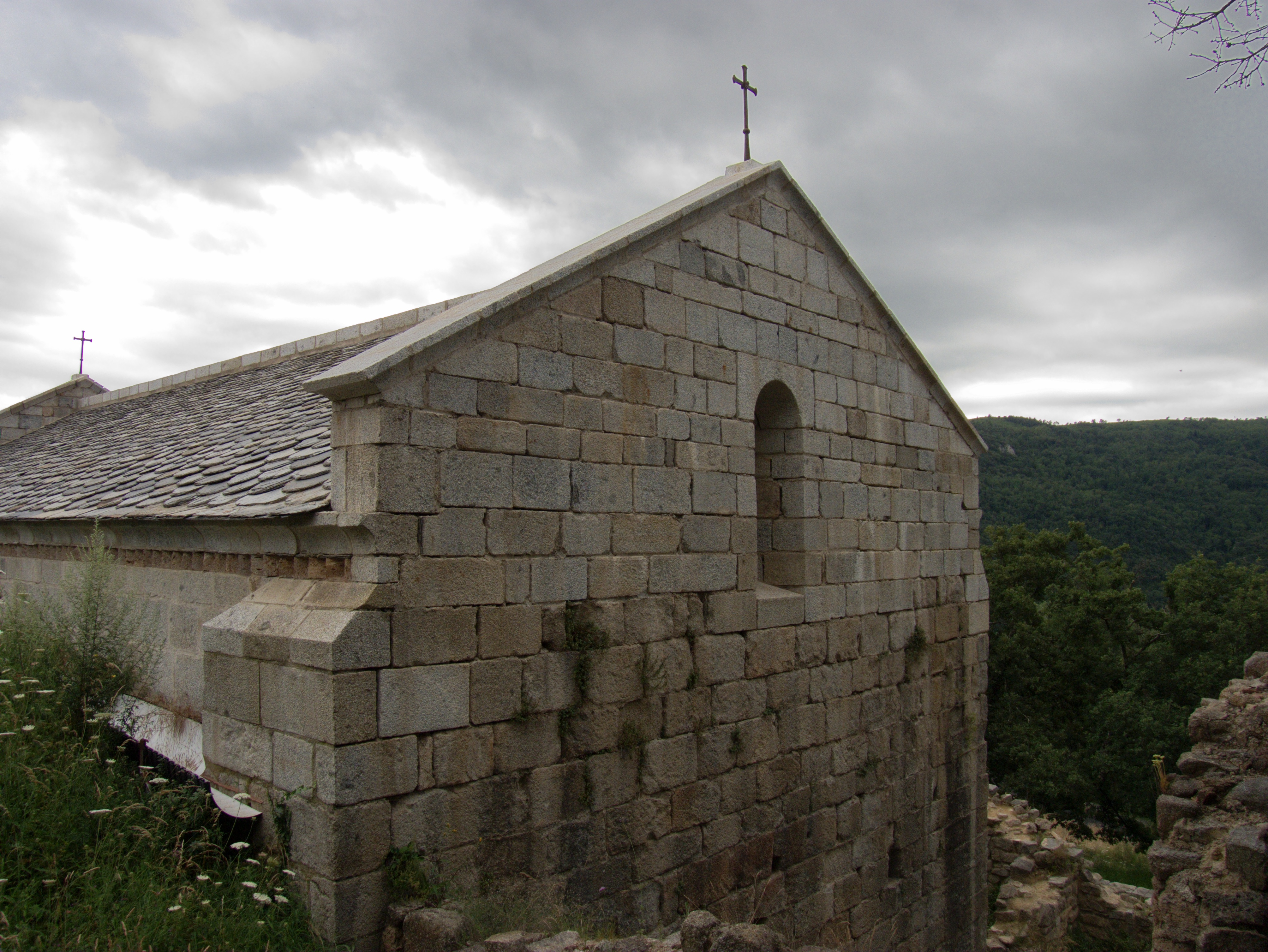 Vue de la façade ouest, ancienne église Saint Martin (12e siècle), Corsavy (Pyrénées-Orientales, Languedoc-Roussillon, France)